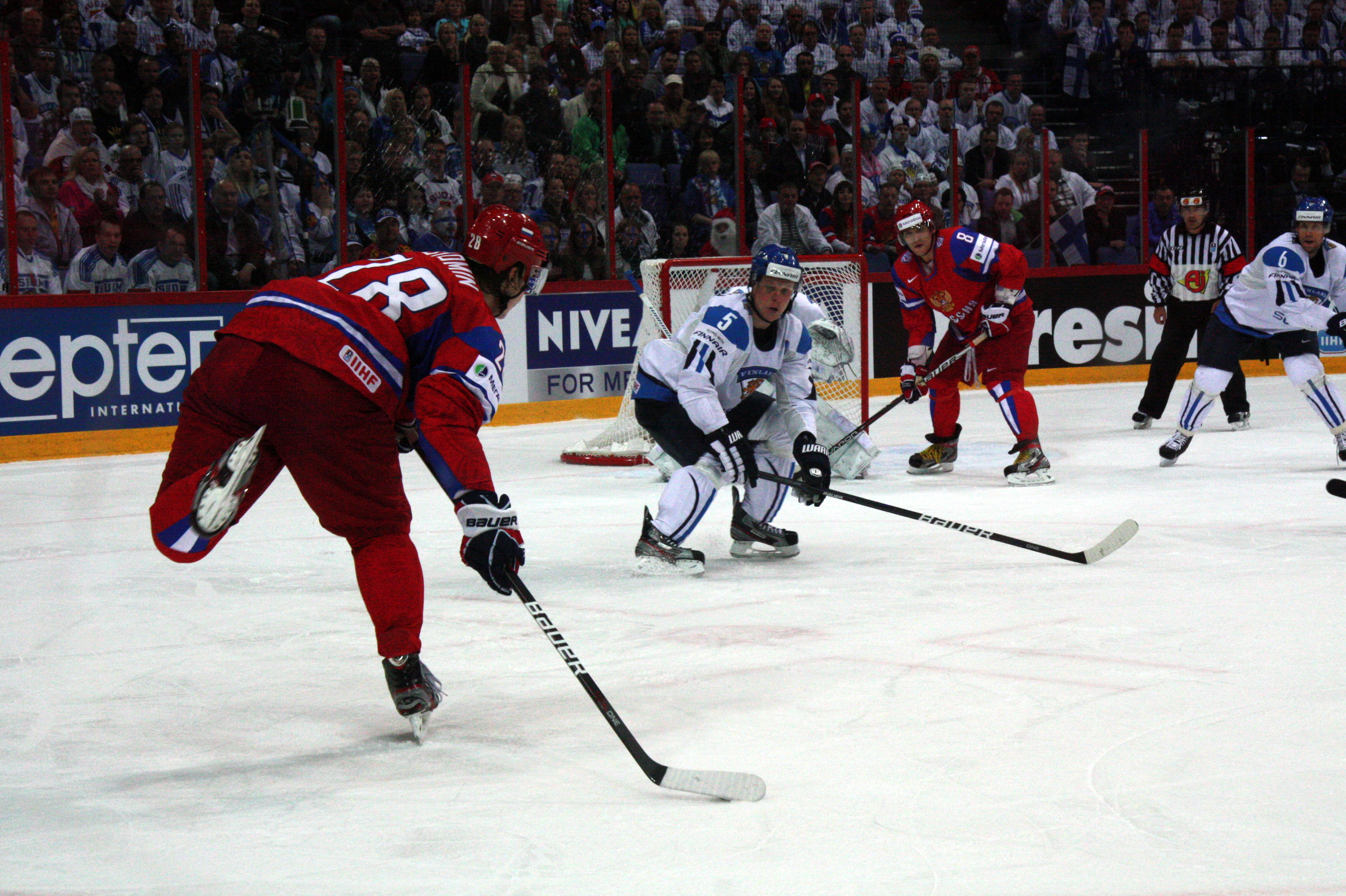 Александр Сёмин атакует ворота сборной Финляндии. ЧМ 2012, Полуфинал, 19.05.2012, Финляндия-Россия, Хельсинки